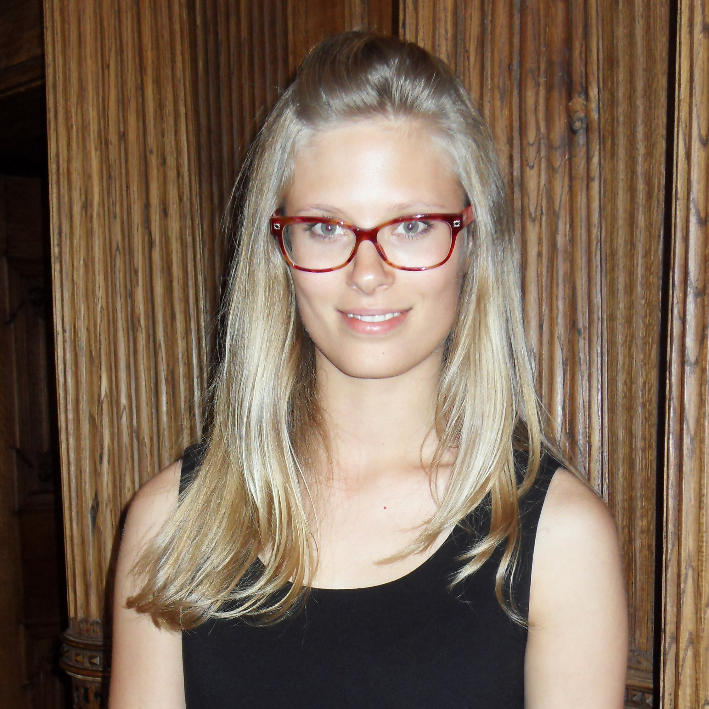 Julia Pietrucha, modelka, aktorka i wokalistka.